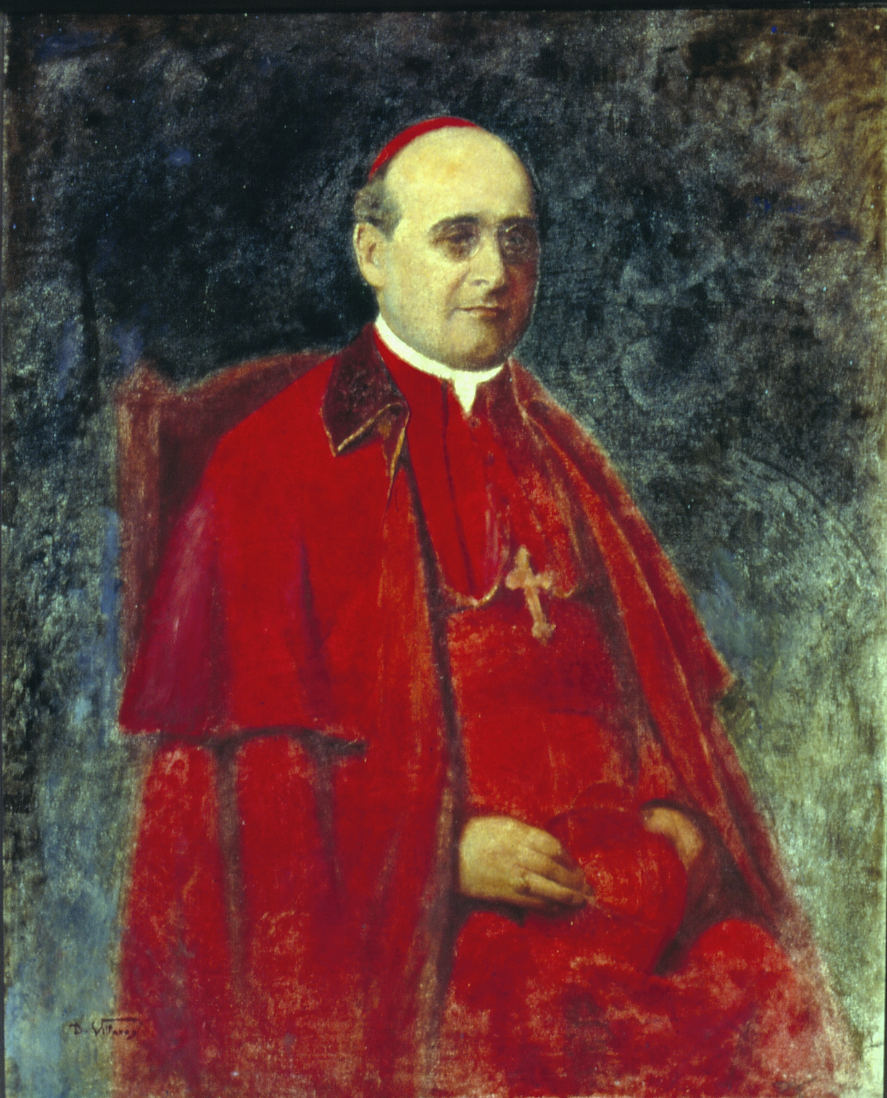 Obra que integra o acervo do Museu Paulista da USP.